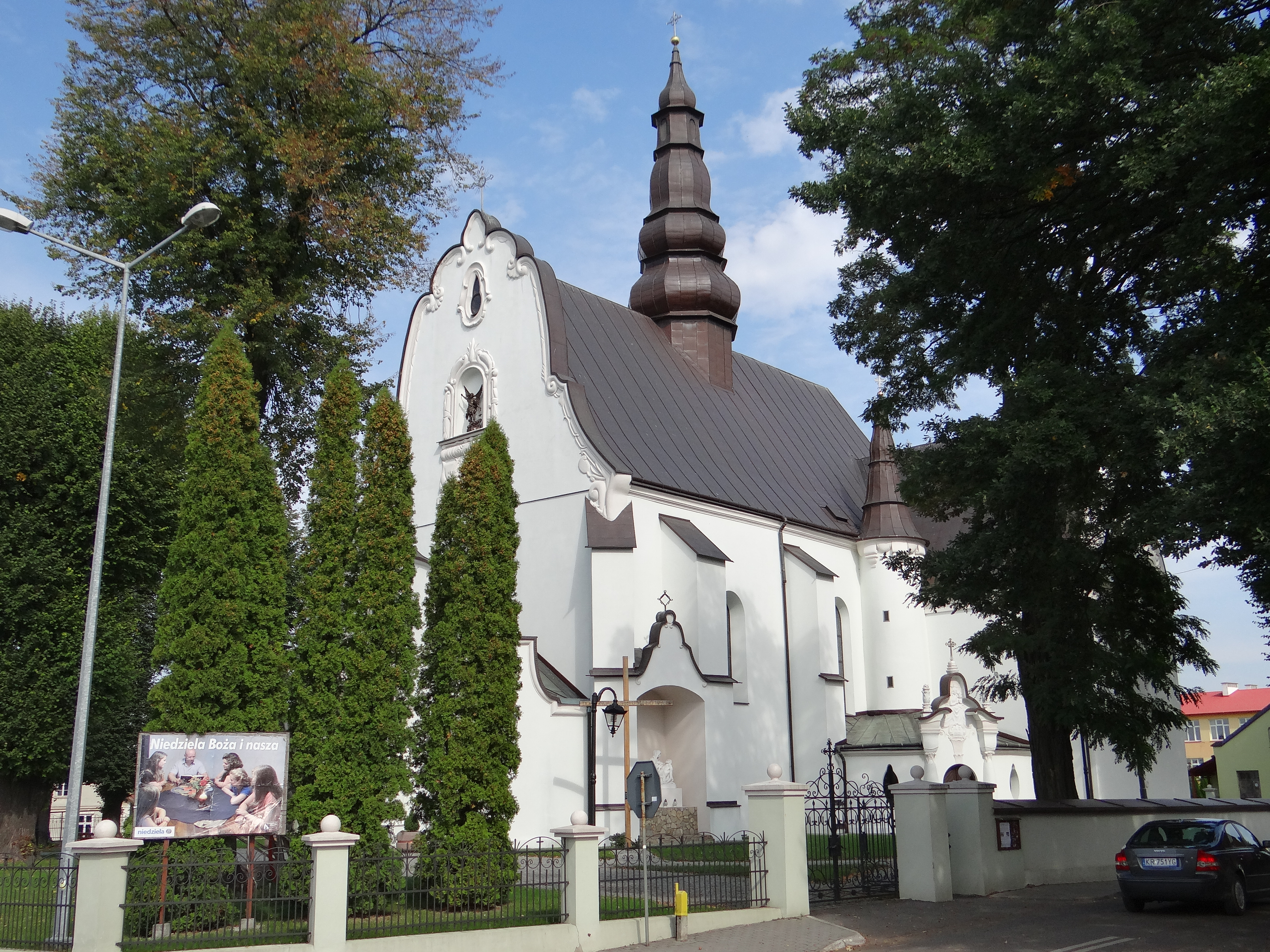 Kańczuga, kościół par. p.w. św. Michała Archanioła, 1605-1612, 1924-1932